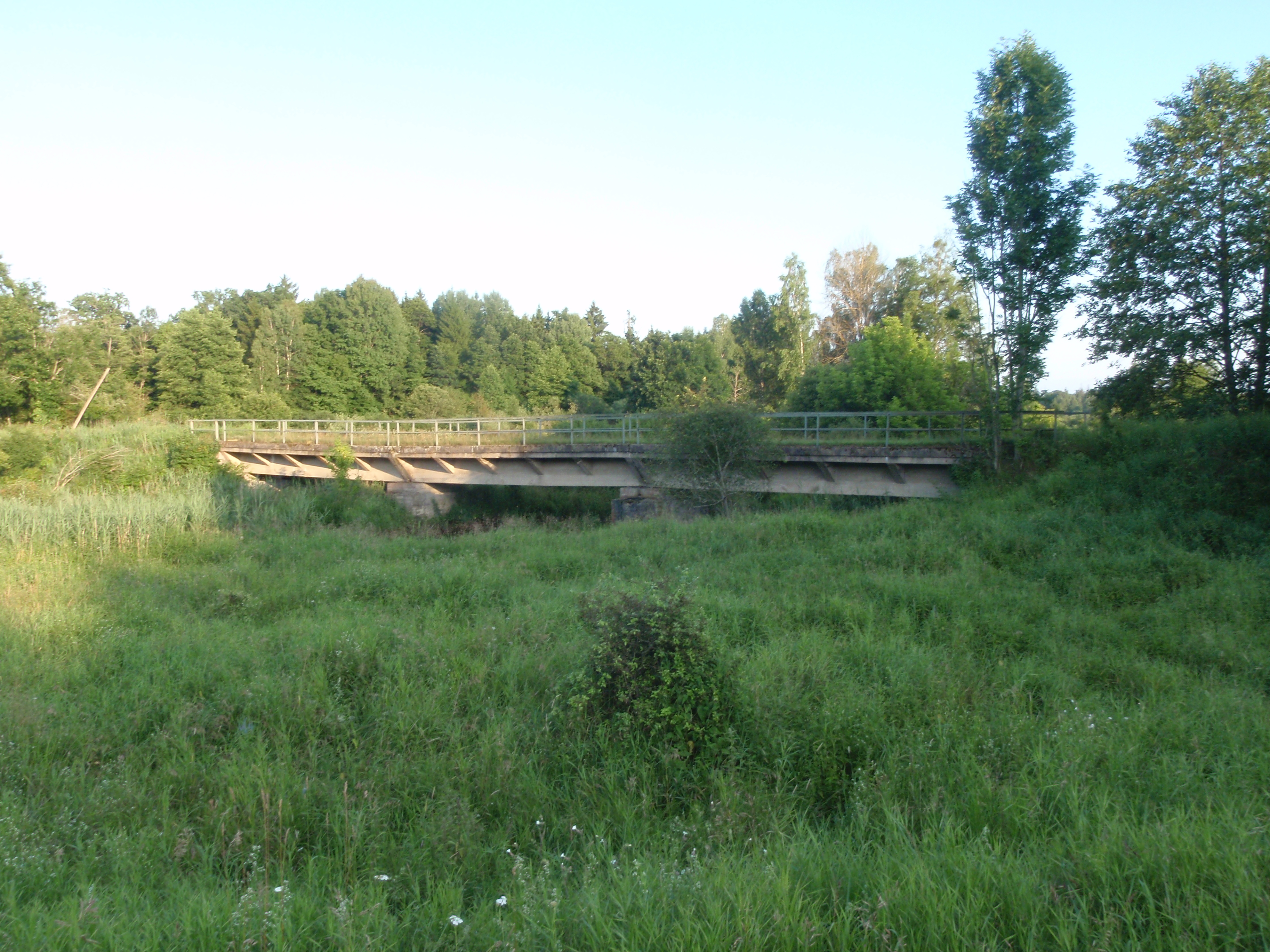 Kosy Most - most kolejowy (kolejki wąskotorowej) nad Narewką